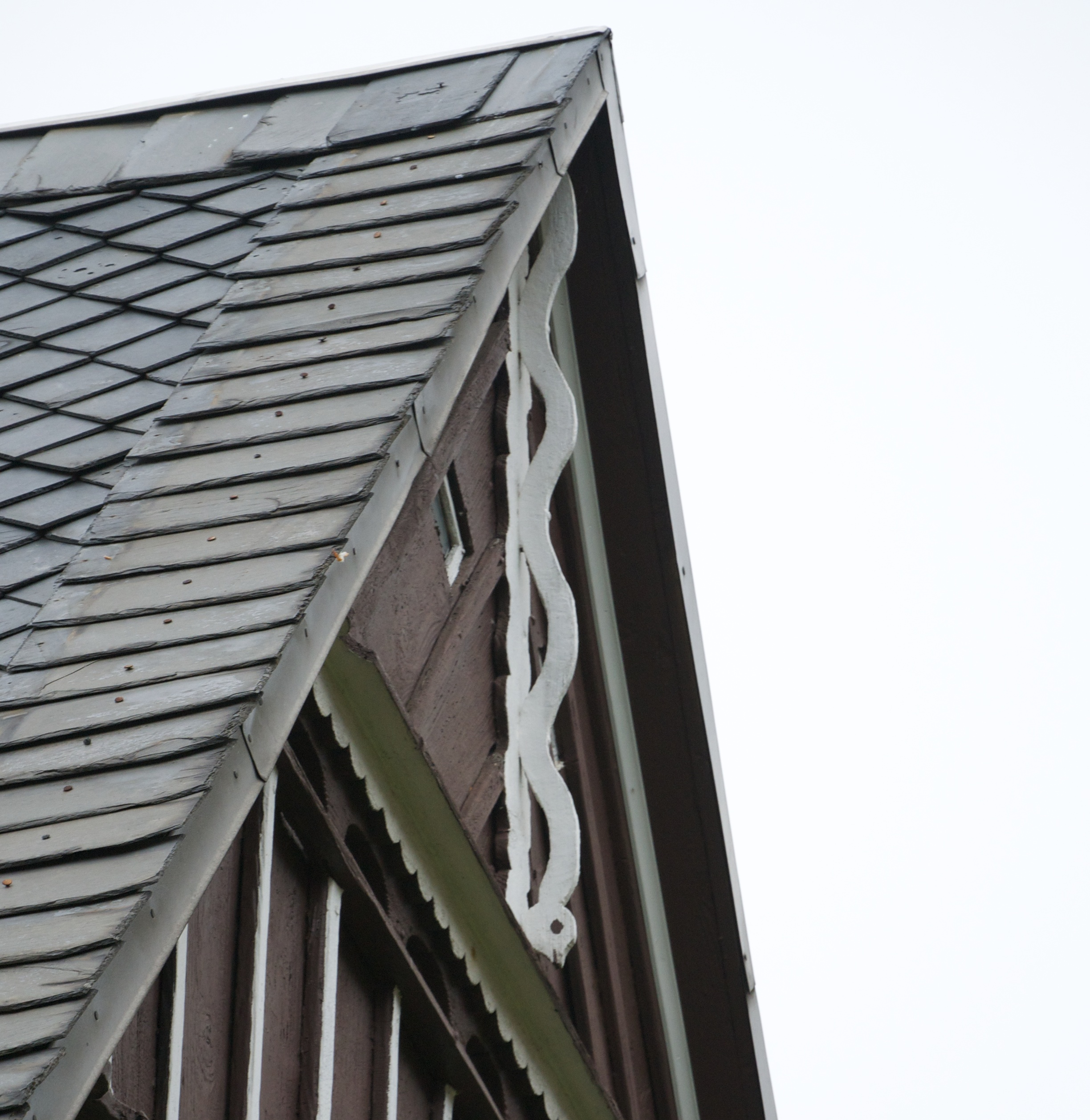 Ebersbach (Sachsen), Röntgenstraße 4 - Blitzschlange